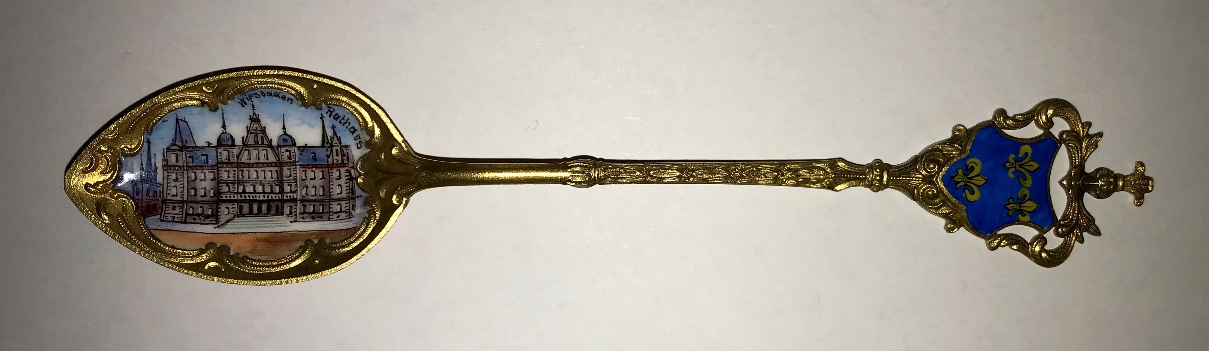 Andenkenlöffel mit der Ansicht des Neuen Rathauses Wiesbaden und dem Stadtwappen, um 1890, Privatsammlung Wiesbaden.